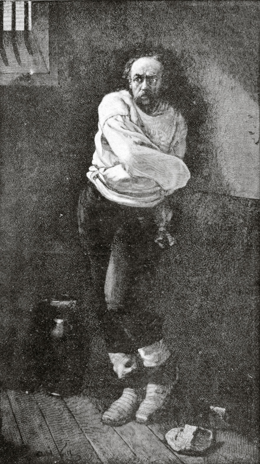 Reproduction dans 1882: Catalogue illustré du Salon.